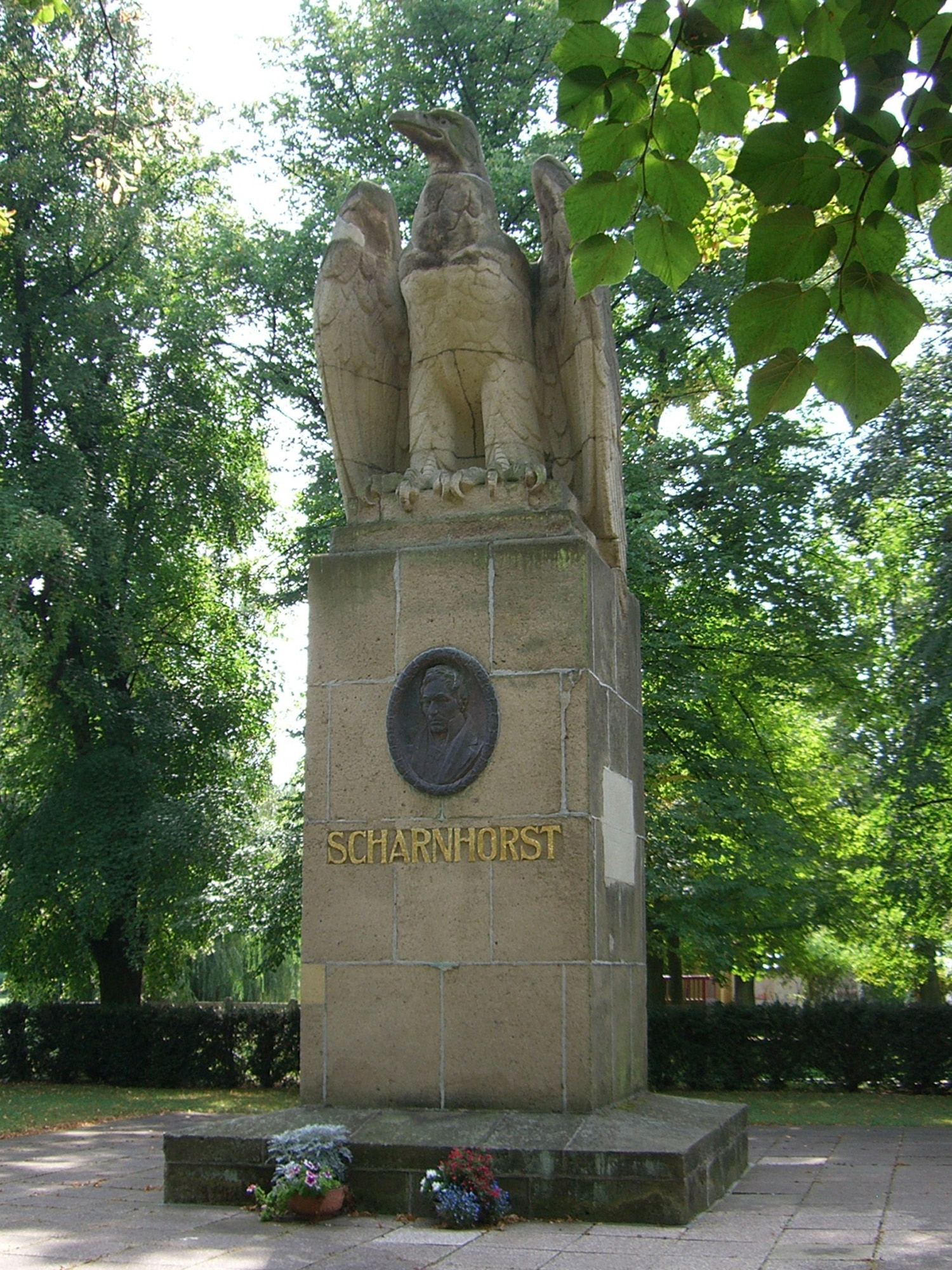 Das Scharnhorst-Denkmal in Großgörschen